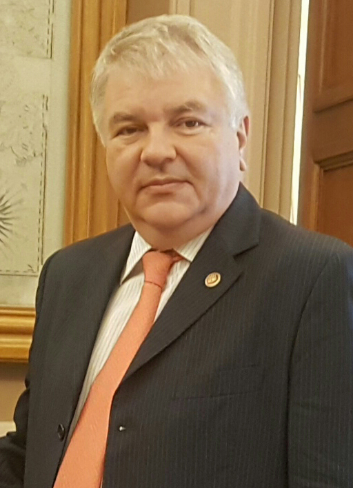 Заместитель Министра иностранных дел Российской Федерации Мешков Алексей Юрьевич